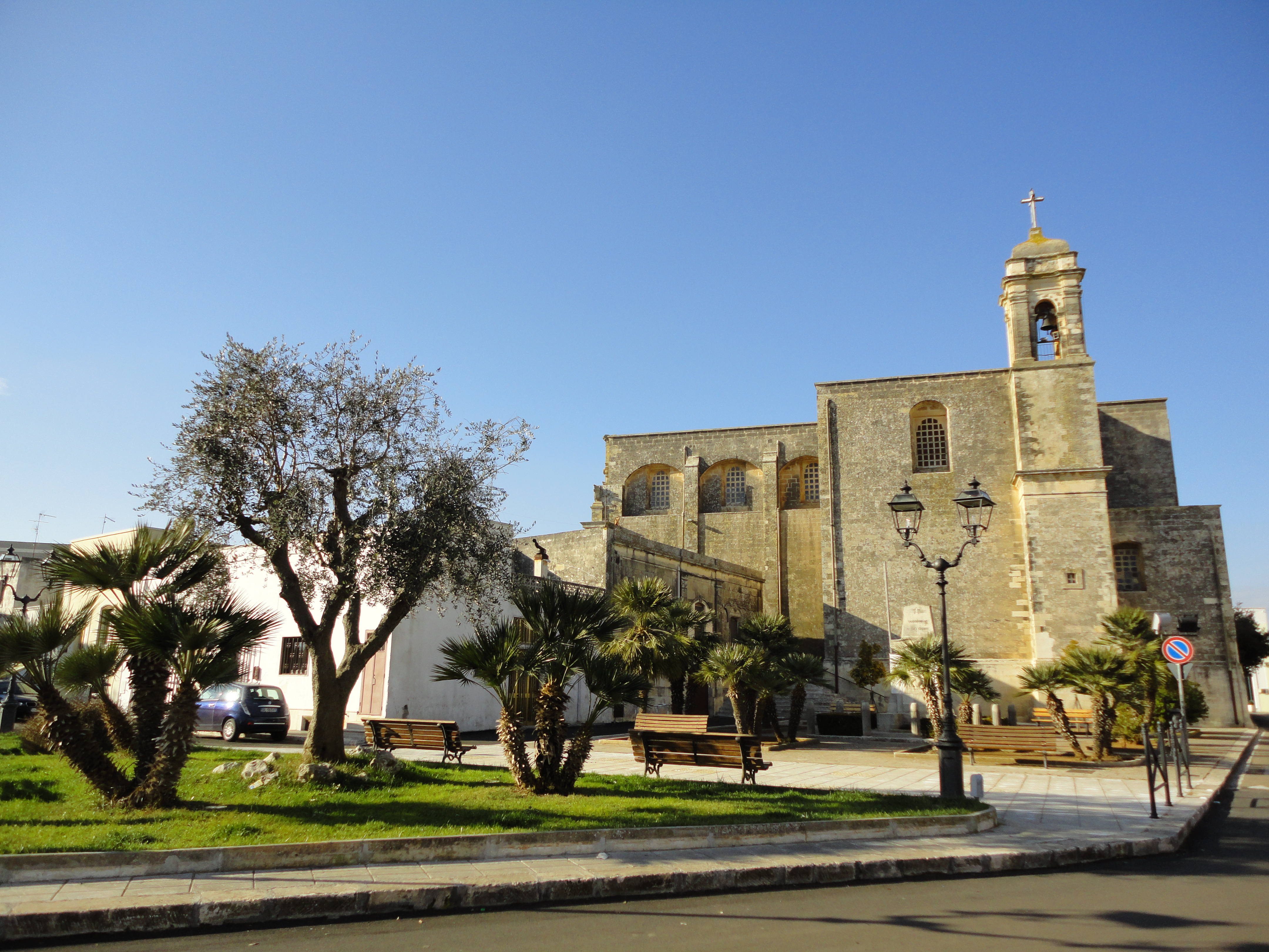 Piazza degli Eroi Giuggianello, Lecce